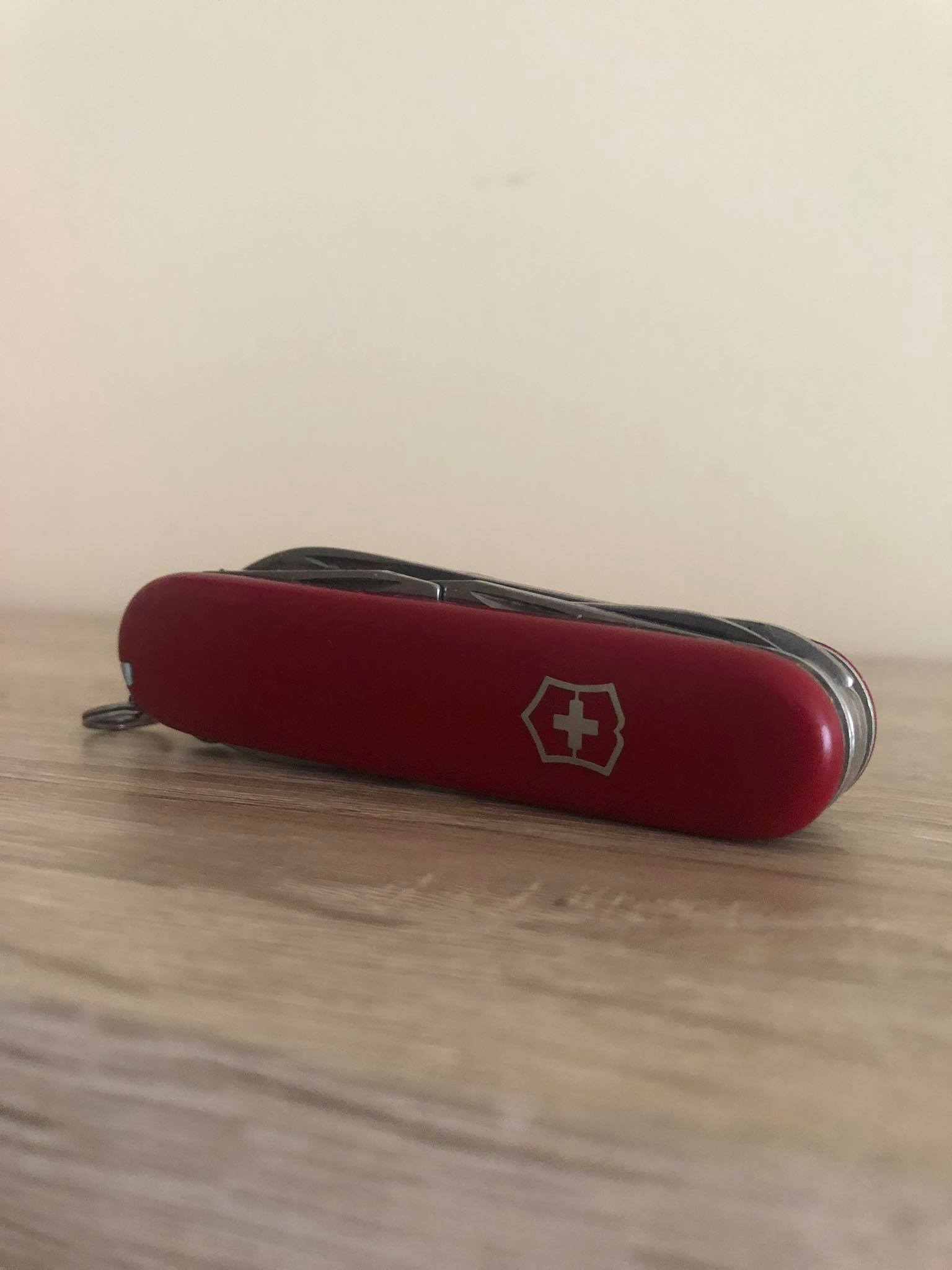 See on nuga